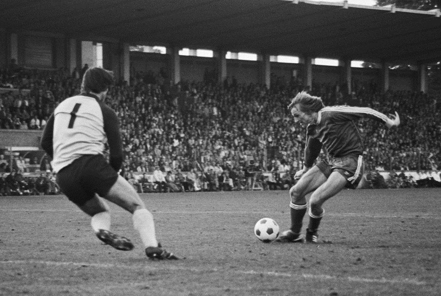 Willem II - PSV 1-1. Adrie Koster (r) scoort voor PSV.